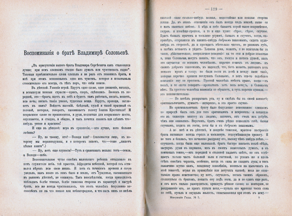 М.С.Безобразова "Воспоминания о брате Владимире Соловьёве" Минувшие годы, 1908, май-июнь